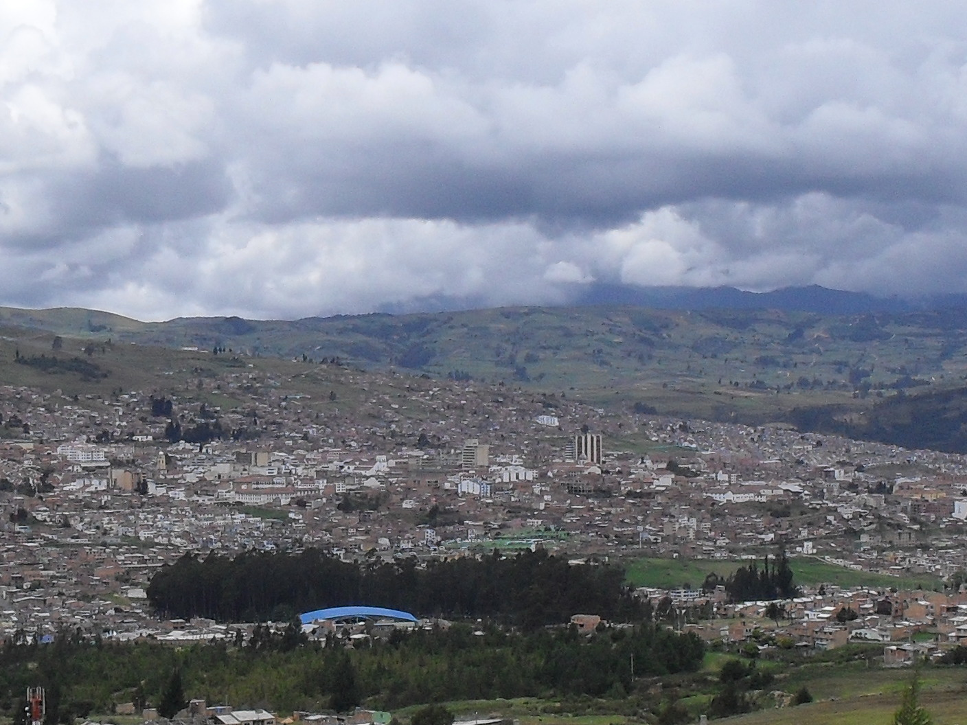 Panorámica del centro histórico de la ciudad de Tunja DHC, Boyacá, Colombia